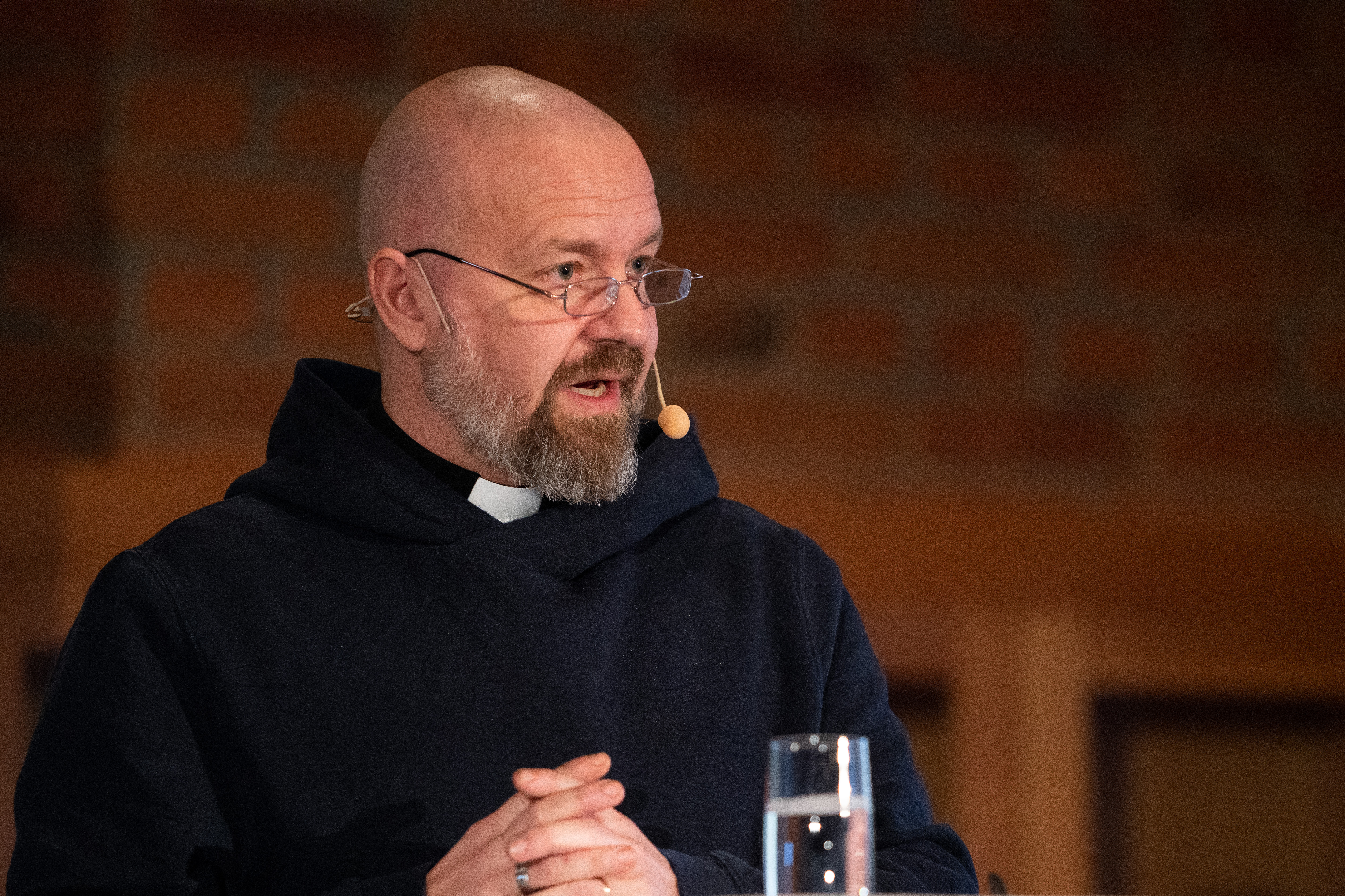 Kent Wisti på Riksantikvarieämbetets höstmöte 2018. Foto: Fredrik Streiffer (CC BY).